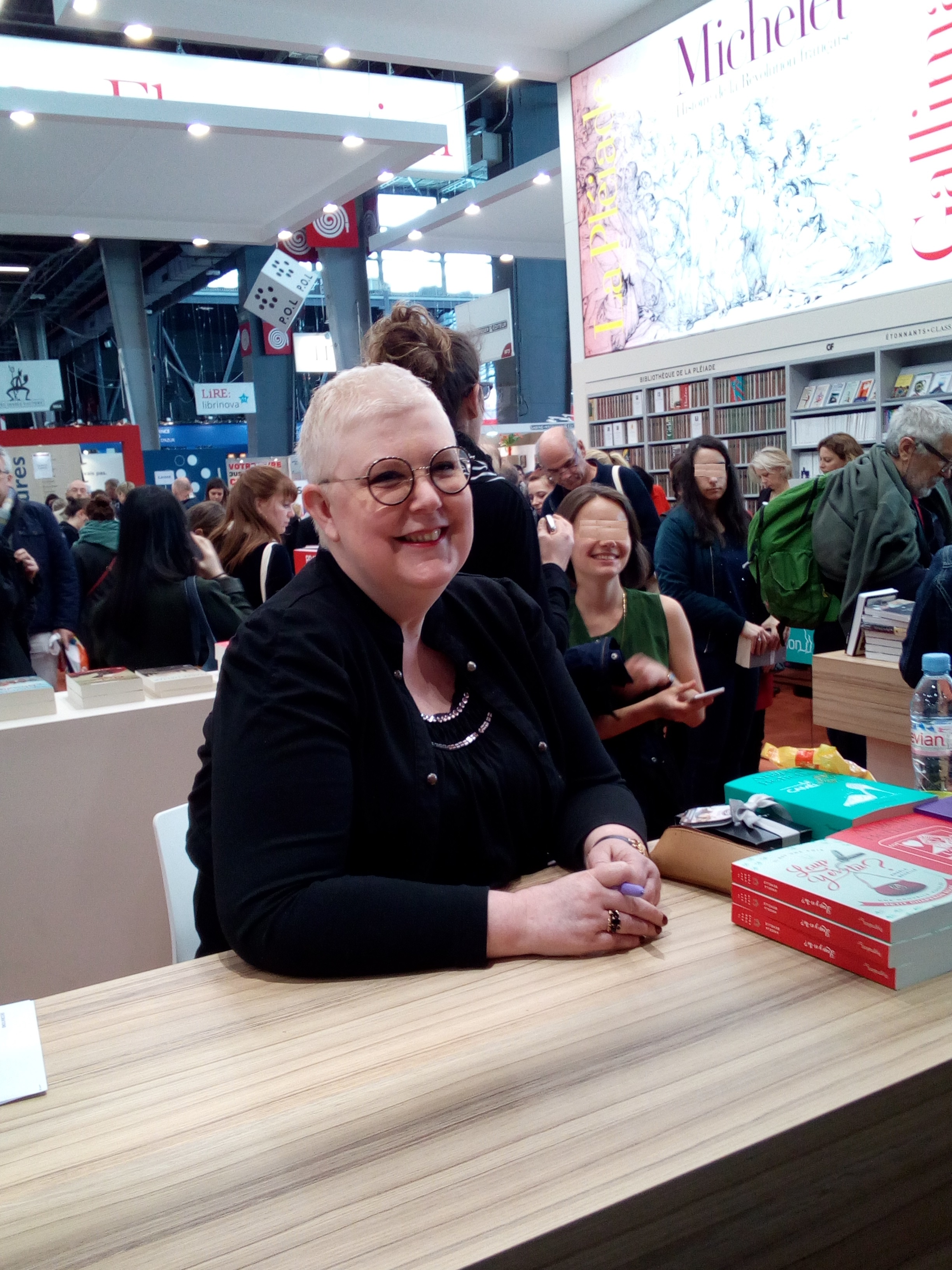 Angela Behelle Livre Paris 2019